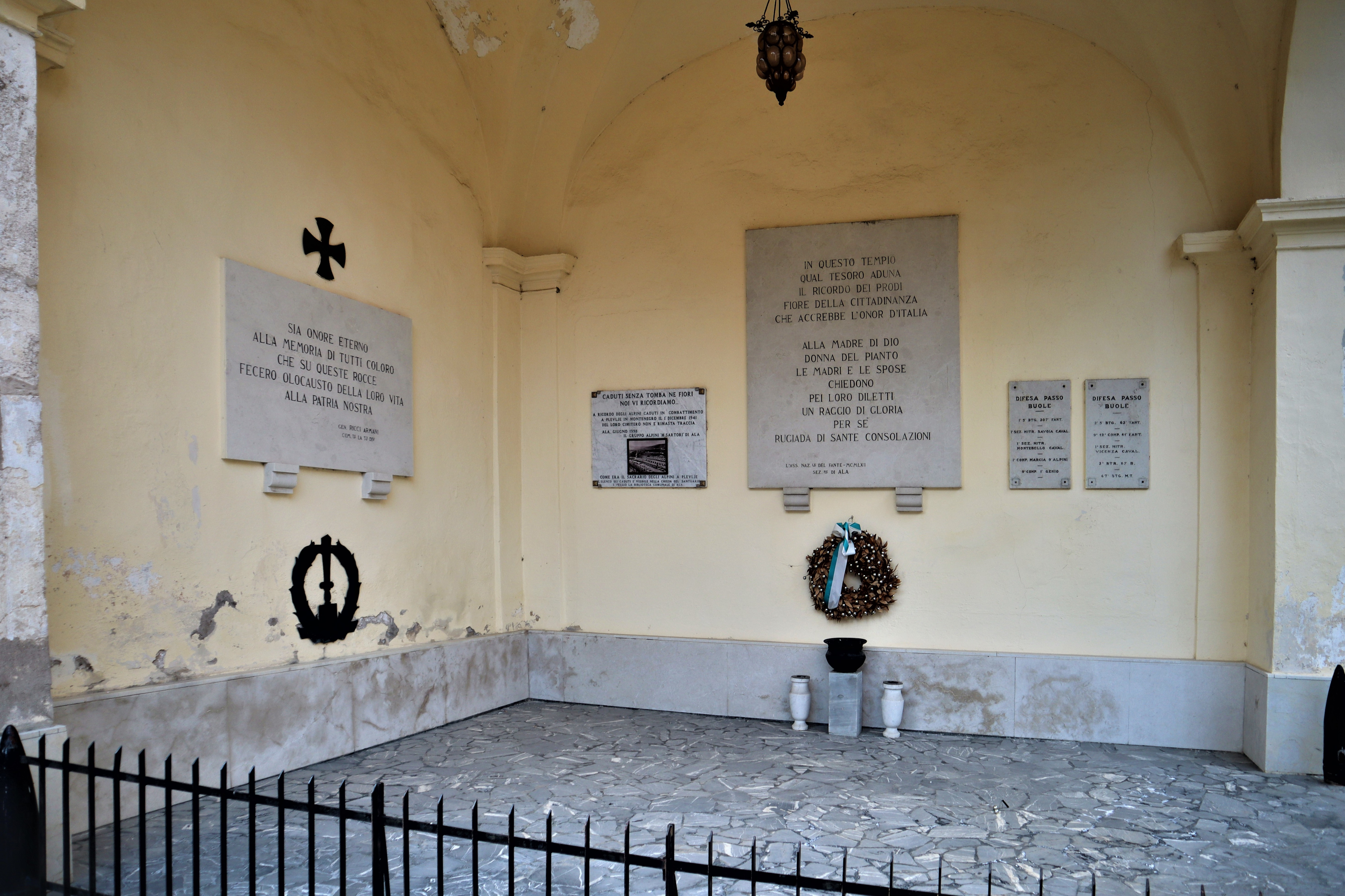 Sacrario alla memoria dei caduti della seconda guerra mondiale costruito nell'edificio della chiesa ma aperto verso l'esterno.